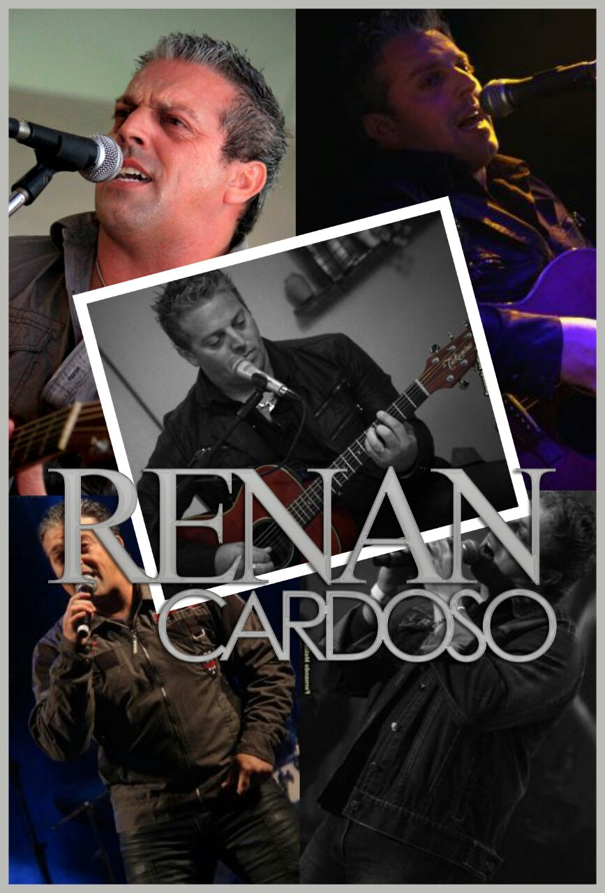 Imagens de shows de Renan Cardoso